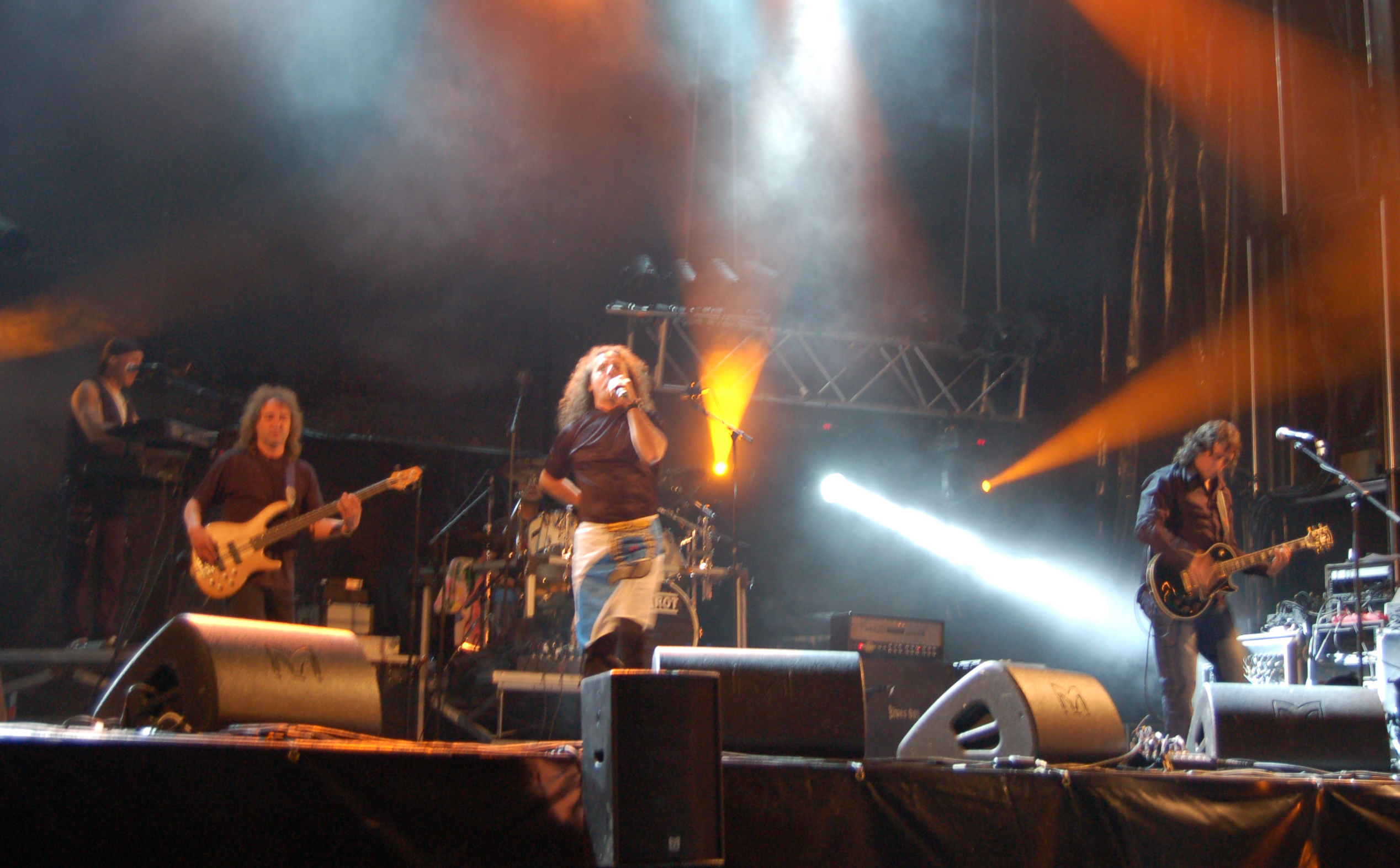 Astarot en concerto na carballeira de Santa Lucía de Moraña